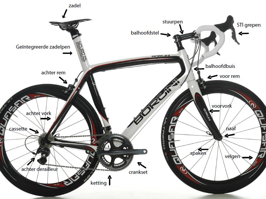 Duidelijke aanduiding van alle onderdelen op een racefiets